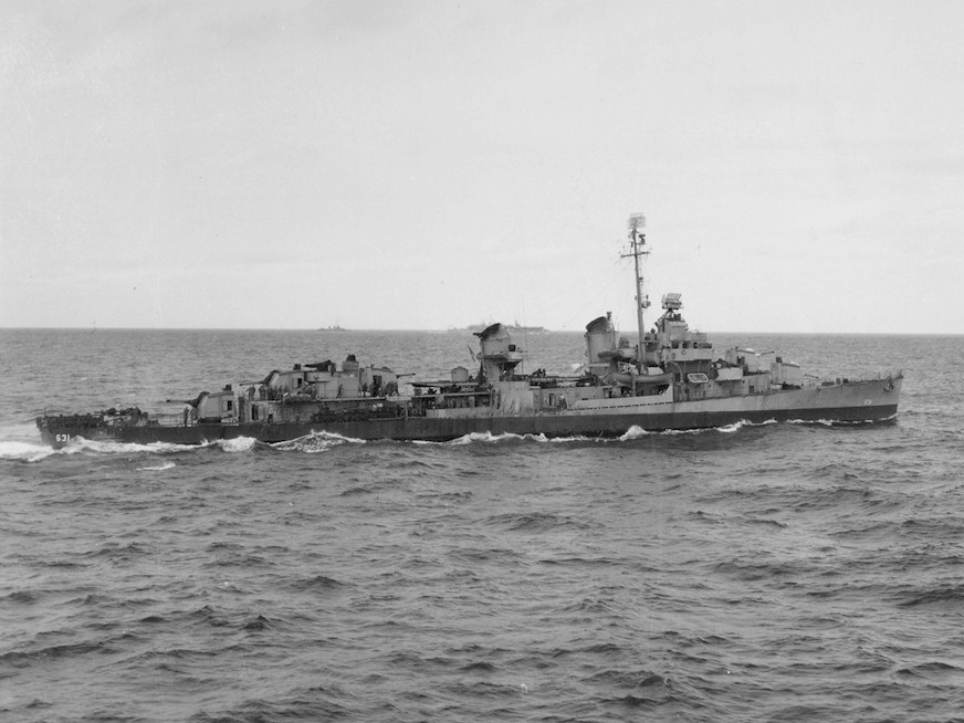 The U.S. Navy destroyer USS Erben (DD-631) underway in September 1945.